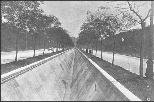 Alameda São Boaventura, fotografia de 1909.